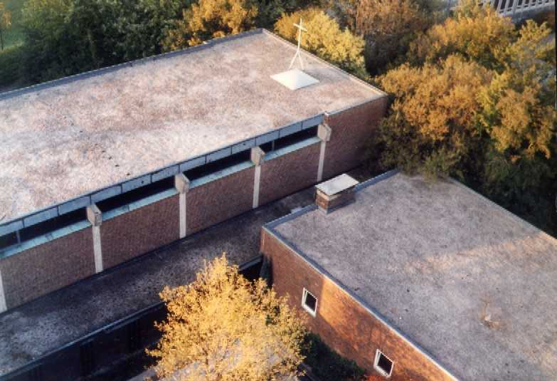 Kirche (re.) und Gemeindhaus vom Turm aus gesehen